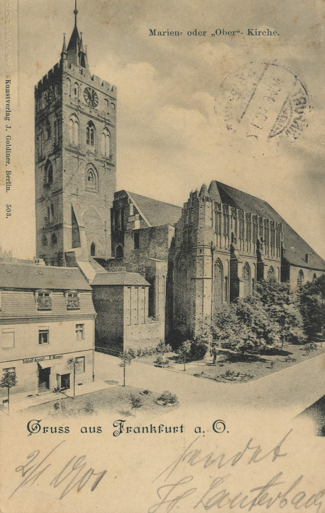 Marienkirche in Frankfurt (Oder) auf einer Ansichtskarte